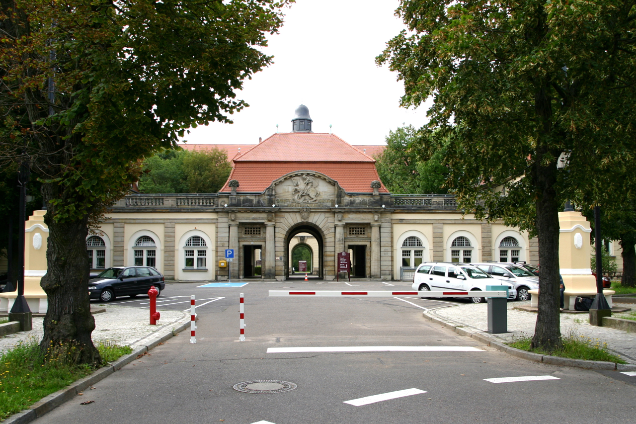 Das Klinikum St. Georg ist das älteste und nach den Universitätskliniken zweitgrößte Krankenhaus in Leipzig.